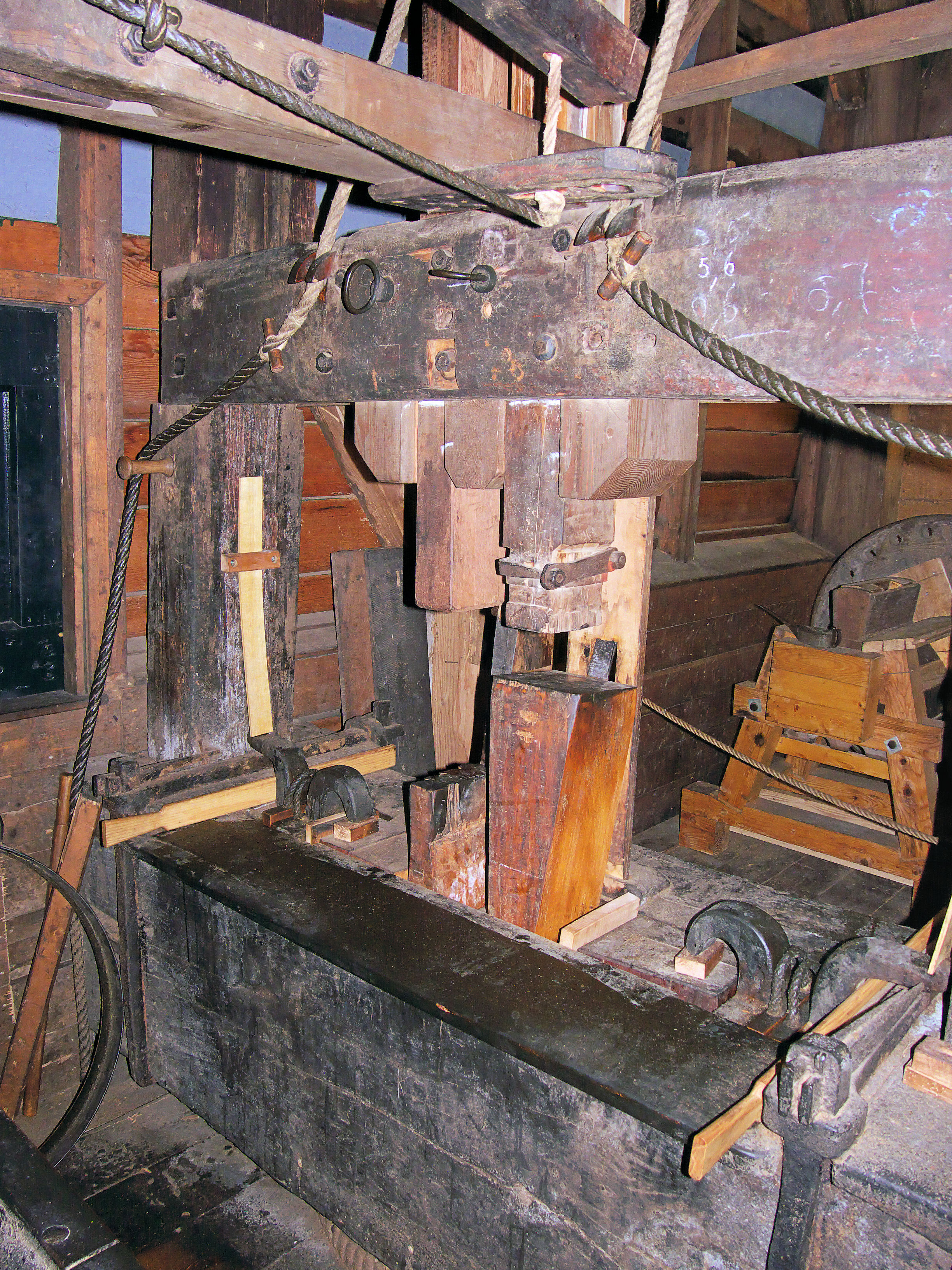 Molen De Passiebloem voorslag